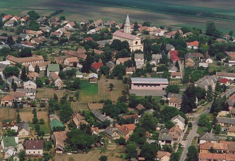 Döbrököz, Hungary, aerial photography